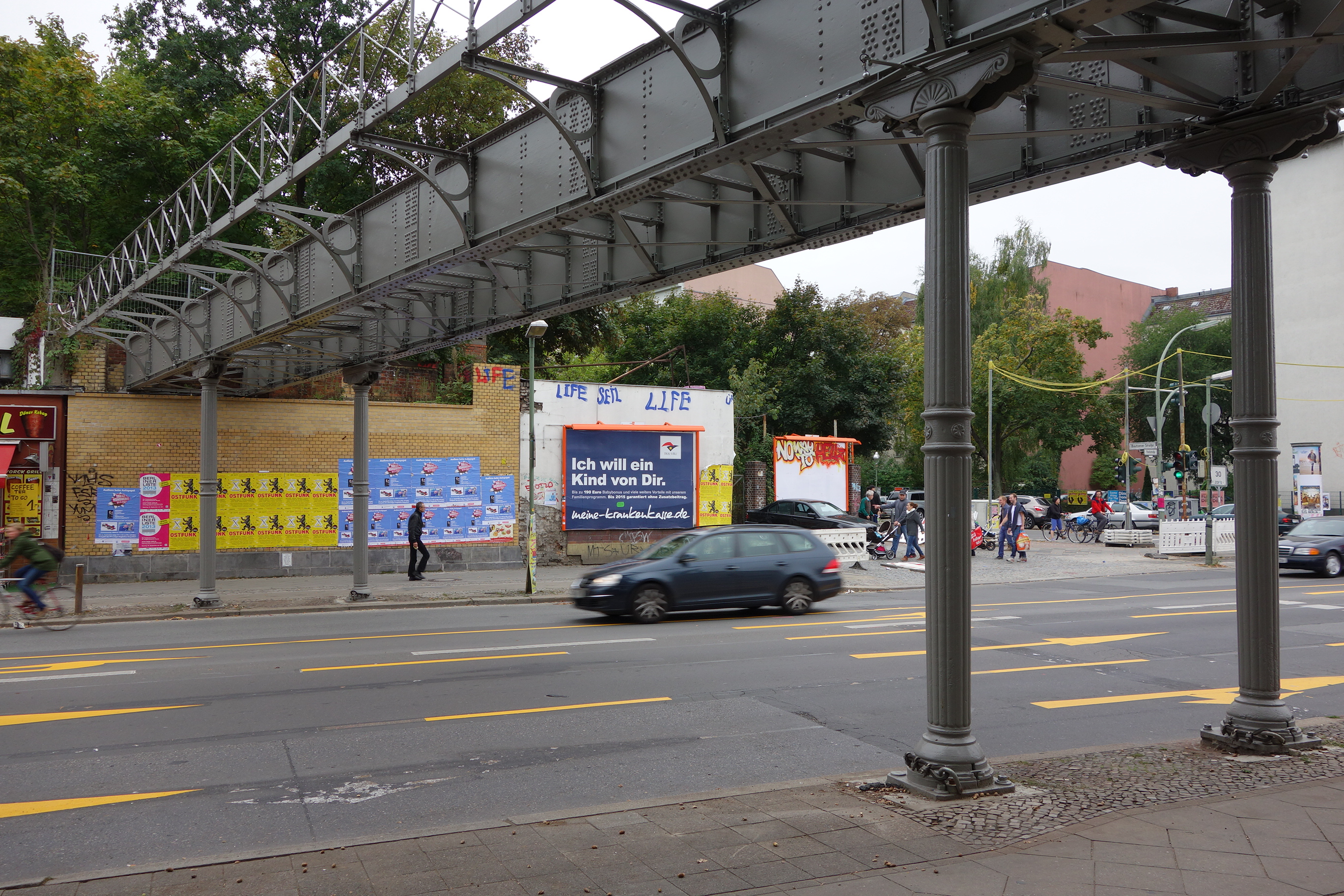 Yorckbrücken in Berlin, Brücke Nr. 5 nach Sanierung